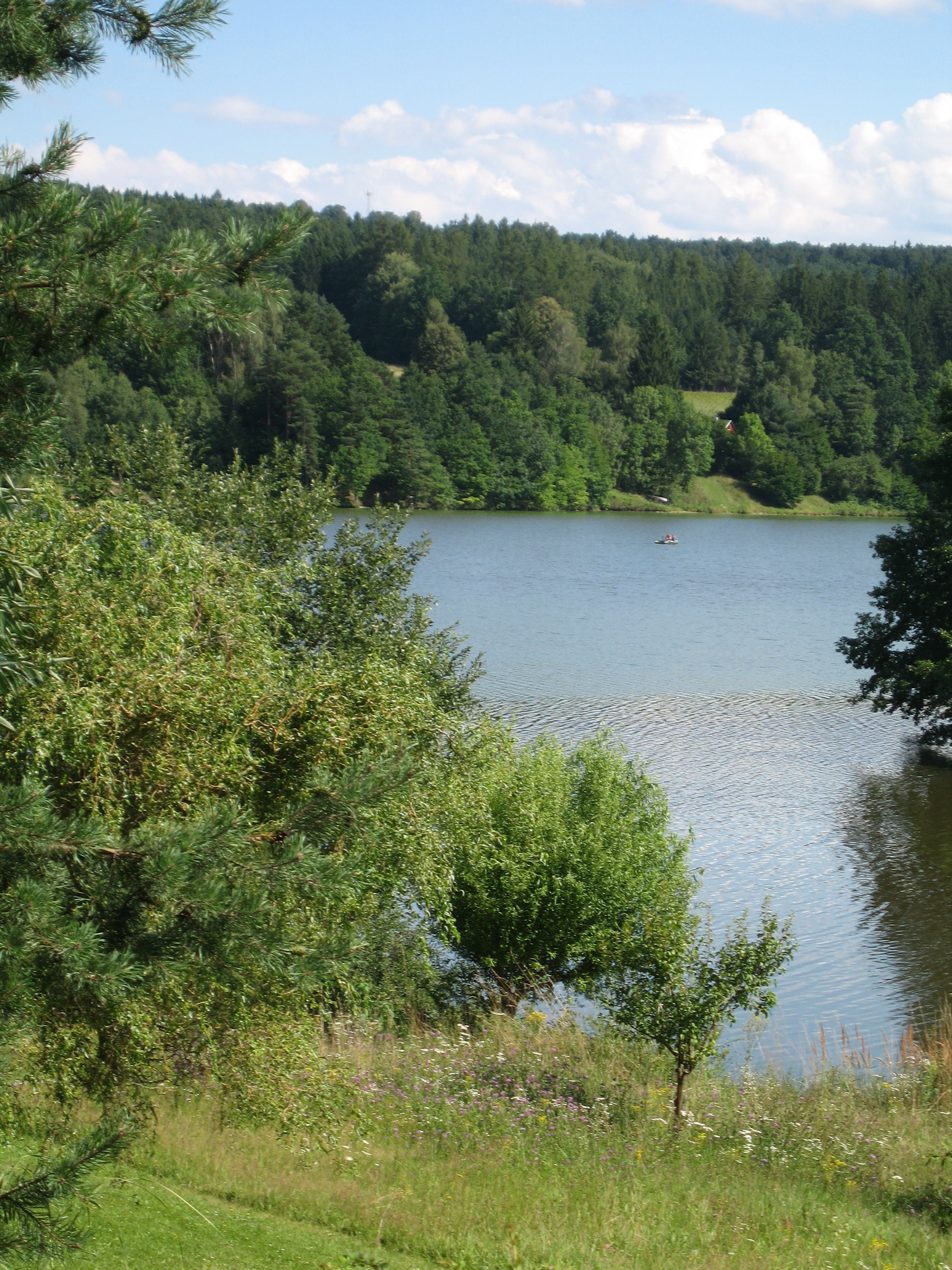 Pohled z chatové osady Buzkov na hladinu hněvkovického přehradního jezera